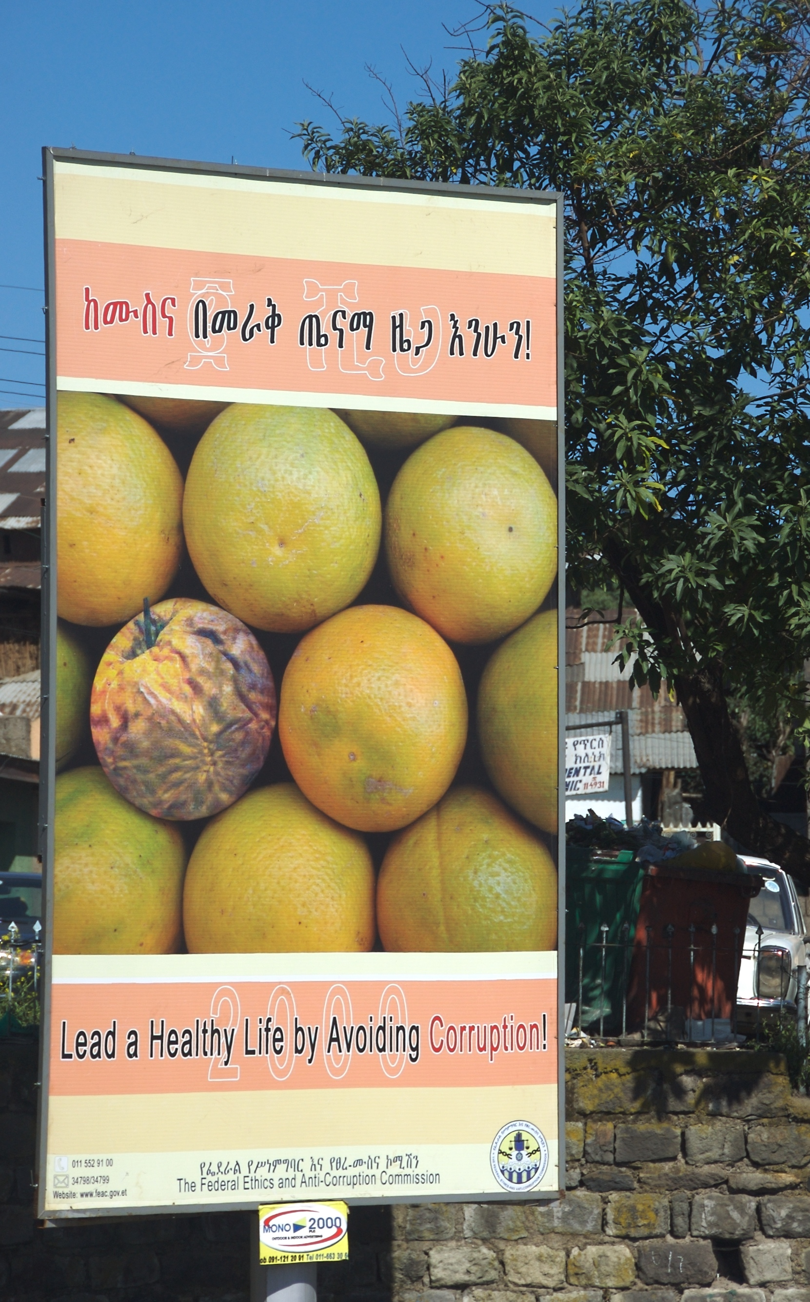 One Rotten Grapefruit . . .